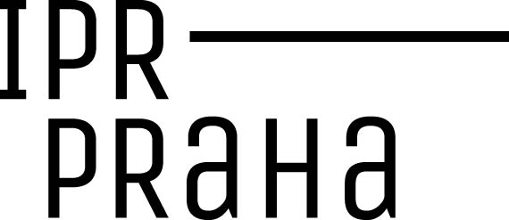 Logo Institutu plánování a rozvoje hl. m. Prahy